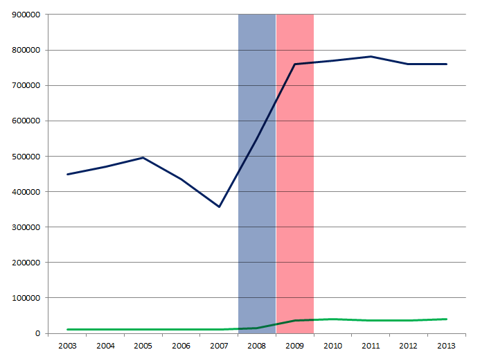 Graphique Spectateurs Tour Down Under